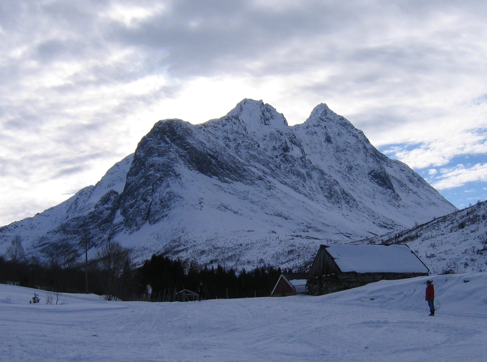 Vassdalstinden, Ørsta,Møre og Romsdal, seen from north